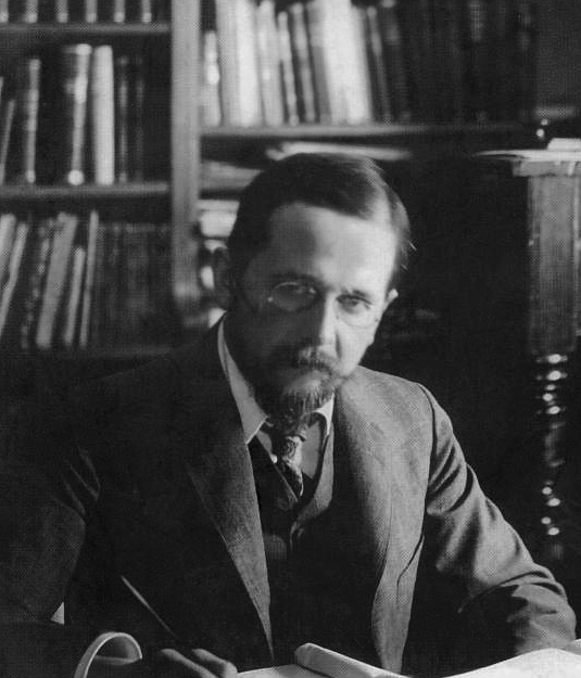 Karl Hampe (Porträt am Schreibpult in Heidelberg)